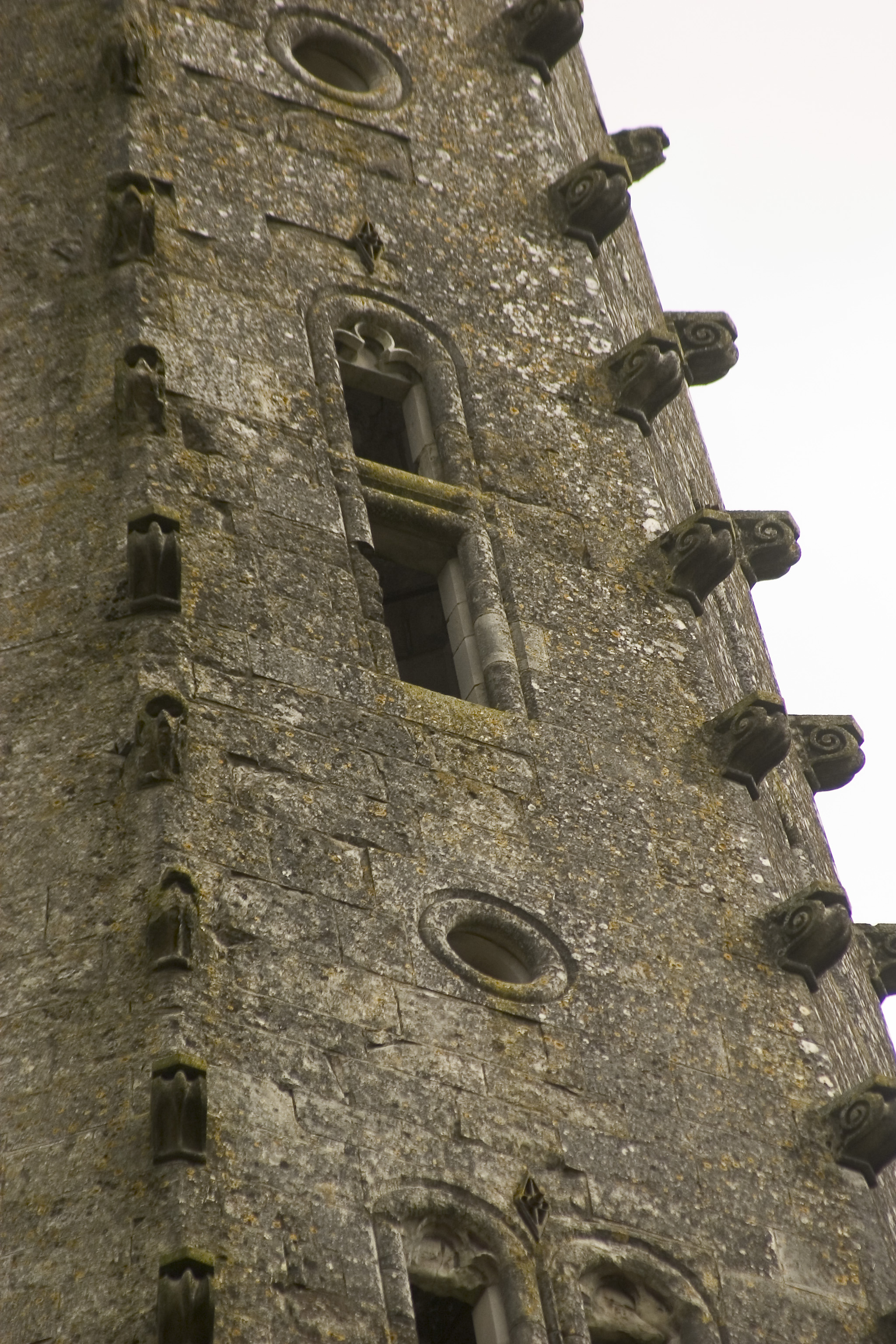 Merck-saint-lièvin fléche à crochets